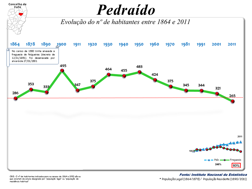 Censos 1864/2011